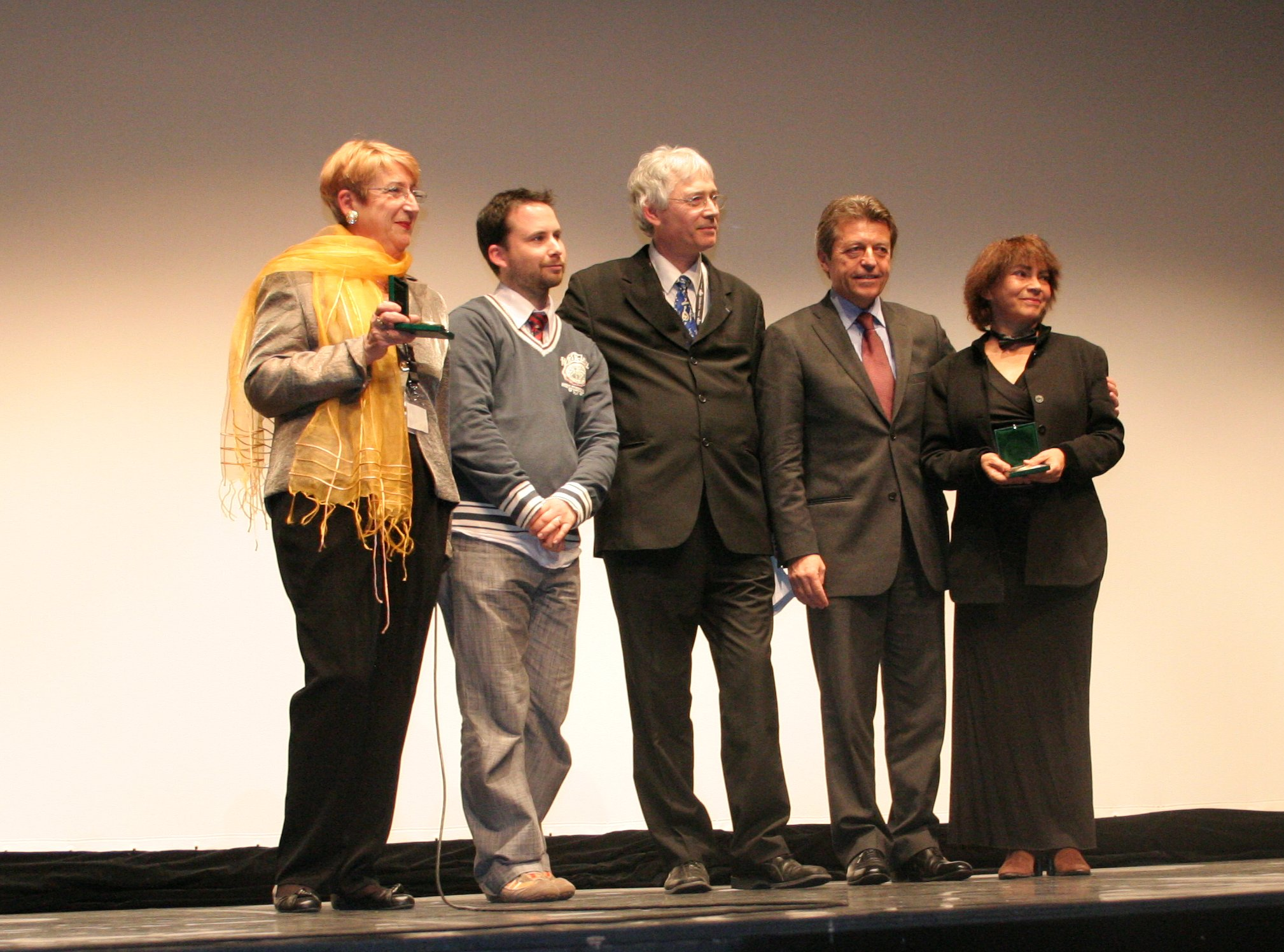 La Grande Médaille de la Francophonie remise par Alain Joyandet à Jocelyne Saab ainsi qu'à Martine et Jean-Marc Thérouanne.